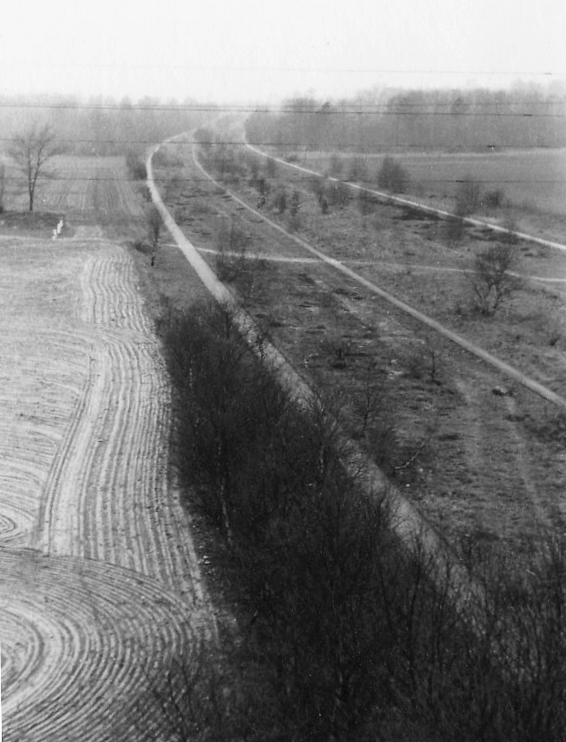 Unvollständiger Autobahnabschnitt Hamburg-Berlin (bei Hamburg) 1960